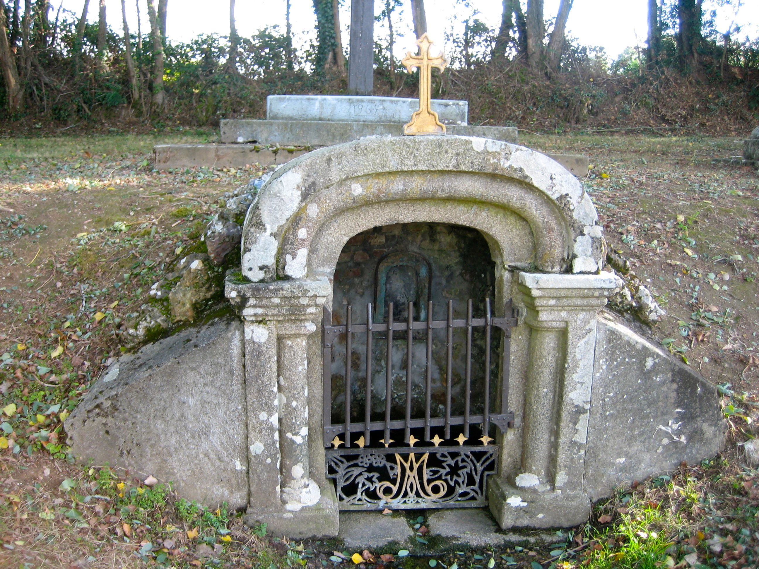 Chapelle Notre-Dame de Vaudouan à Briantes